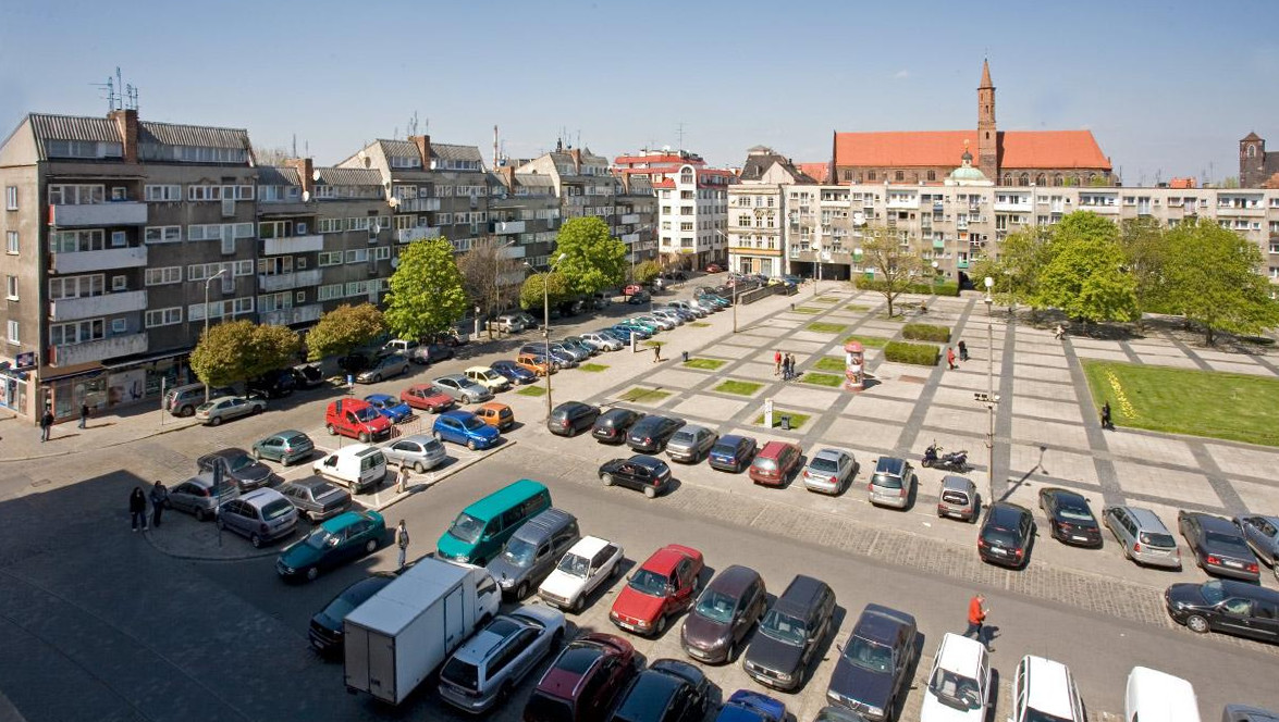 Kiedyś to miejsce wyglądało tak .